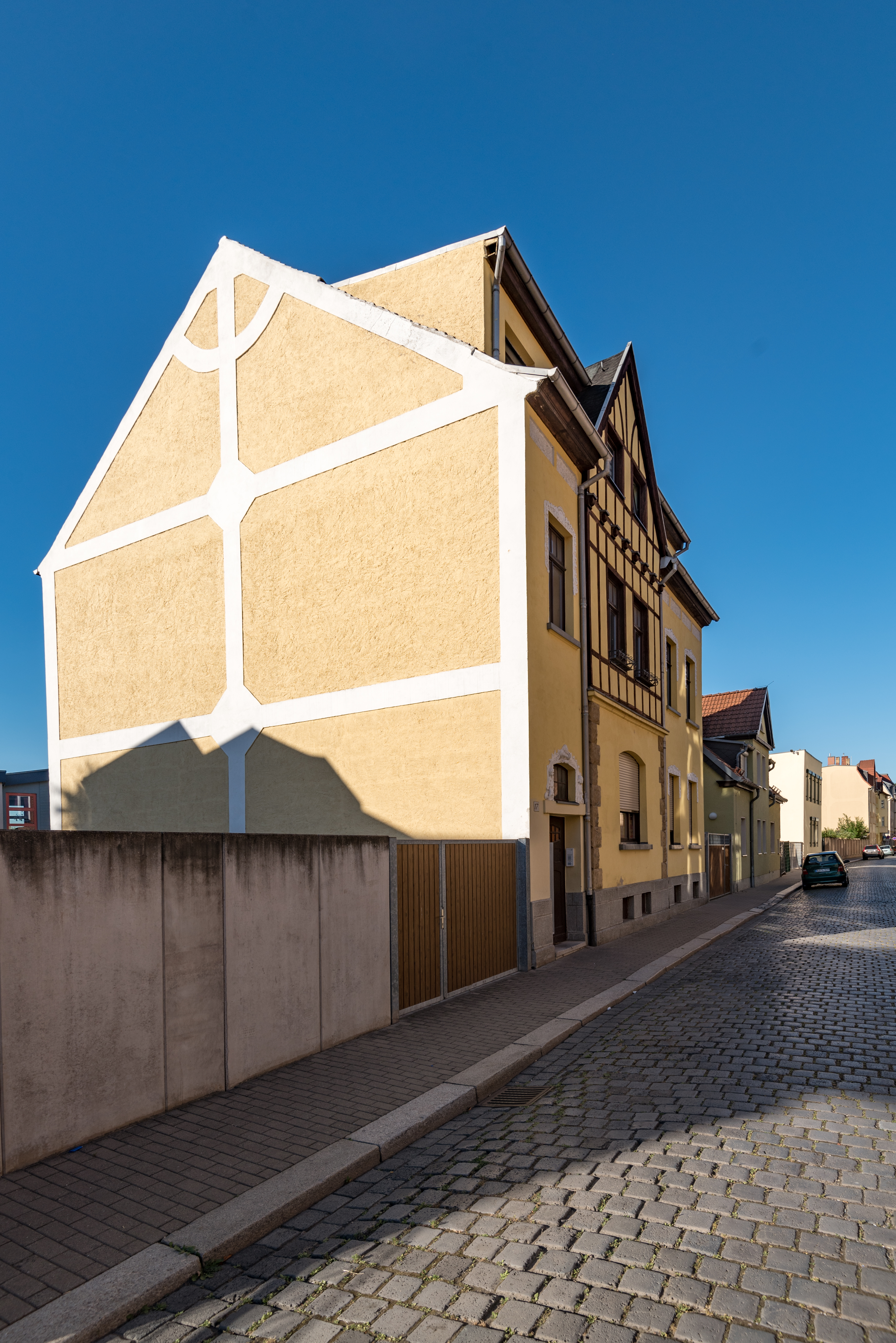 Weißenfels, Rudolf-Götze-Straße 17